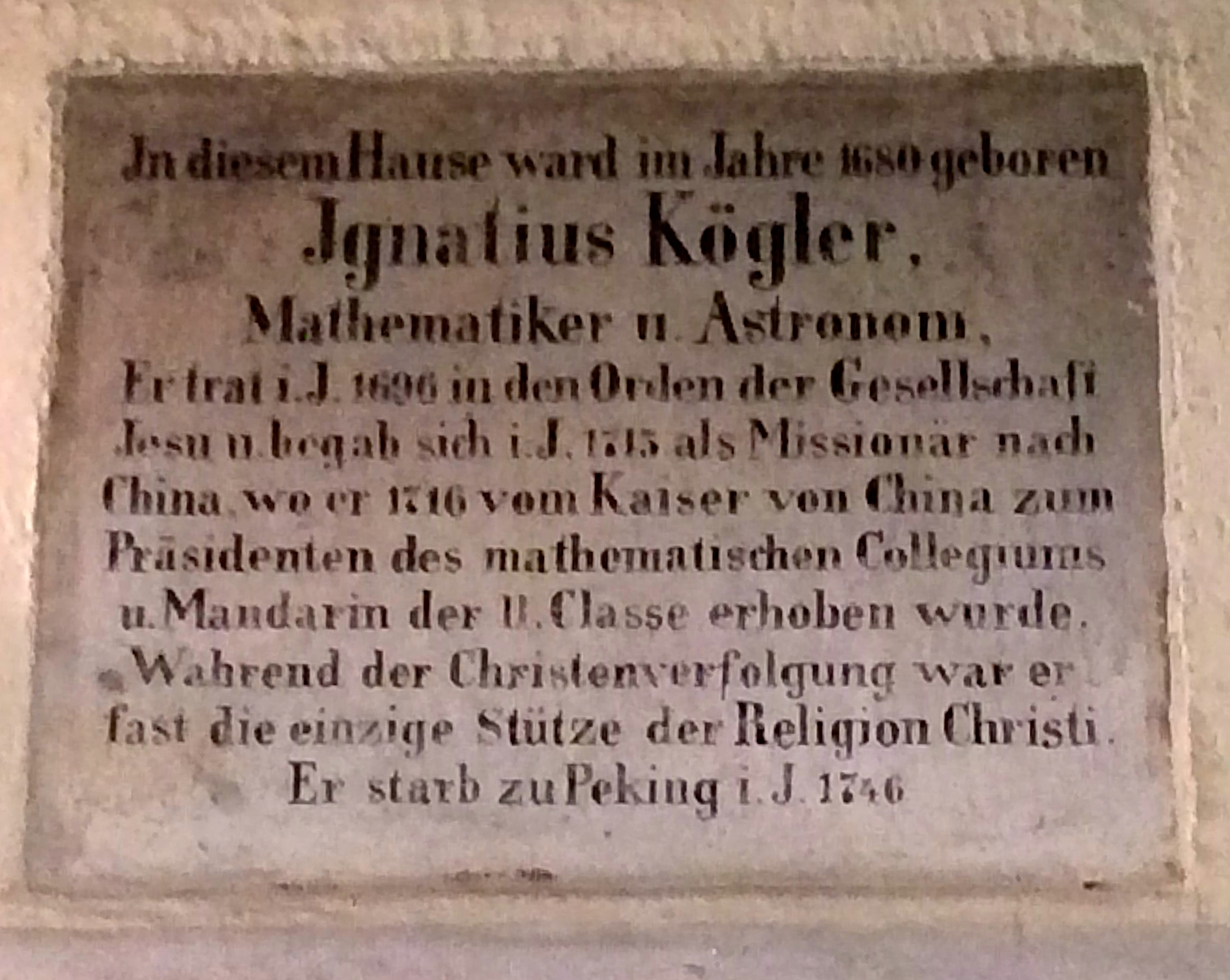 Gedenktafel am Geburtshaus von Ignaz Kögler